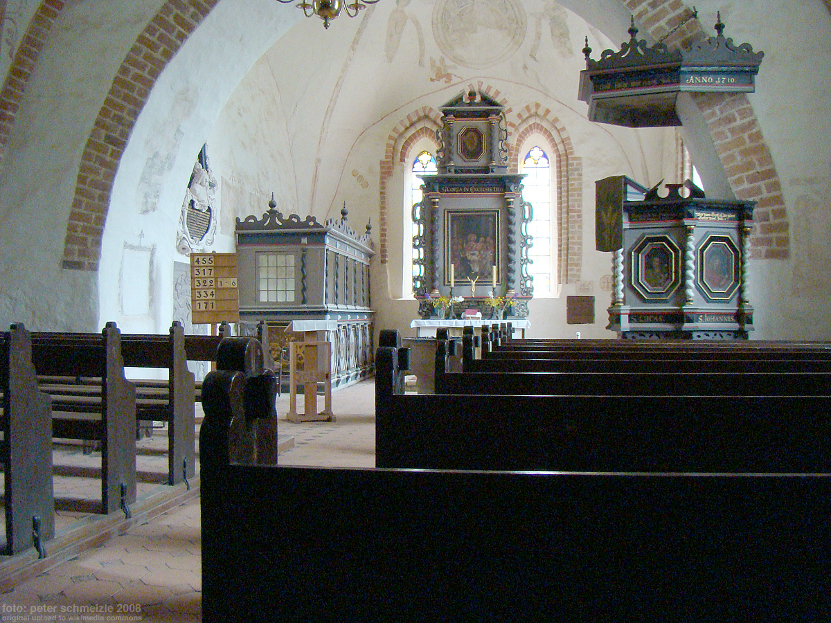 Dorfkirche Groß Gievitz, Blick zum Chor